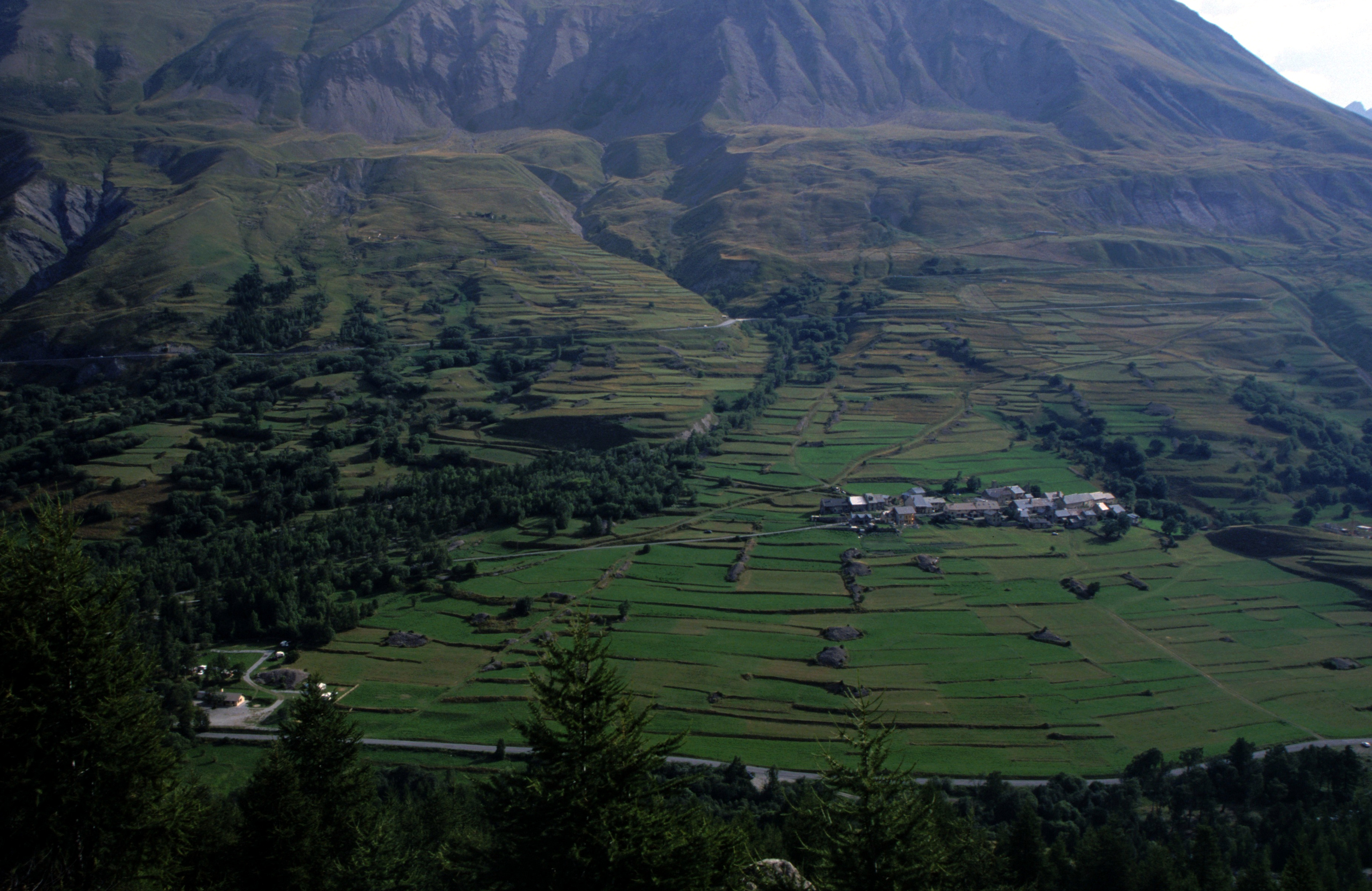 Pendant la montée au refuge de l'Aigle. Le hameau du Pied du Col à Villar-d'Arêne. Diapo scannée.